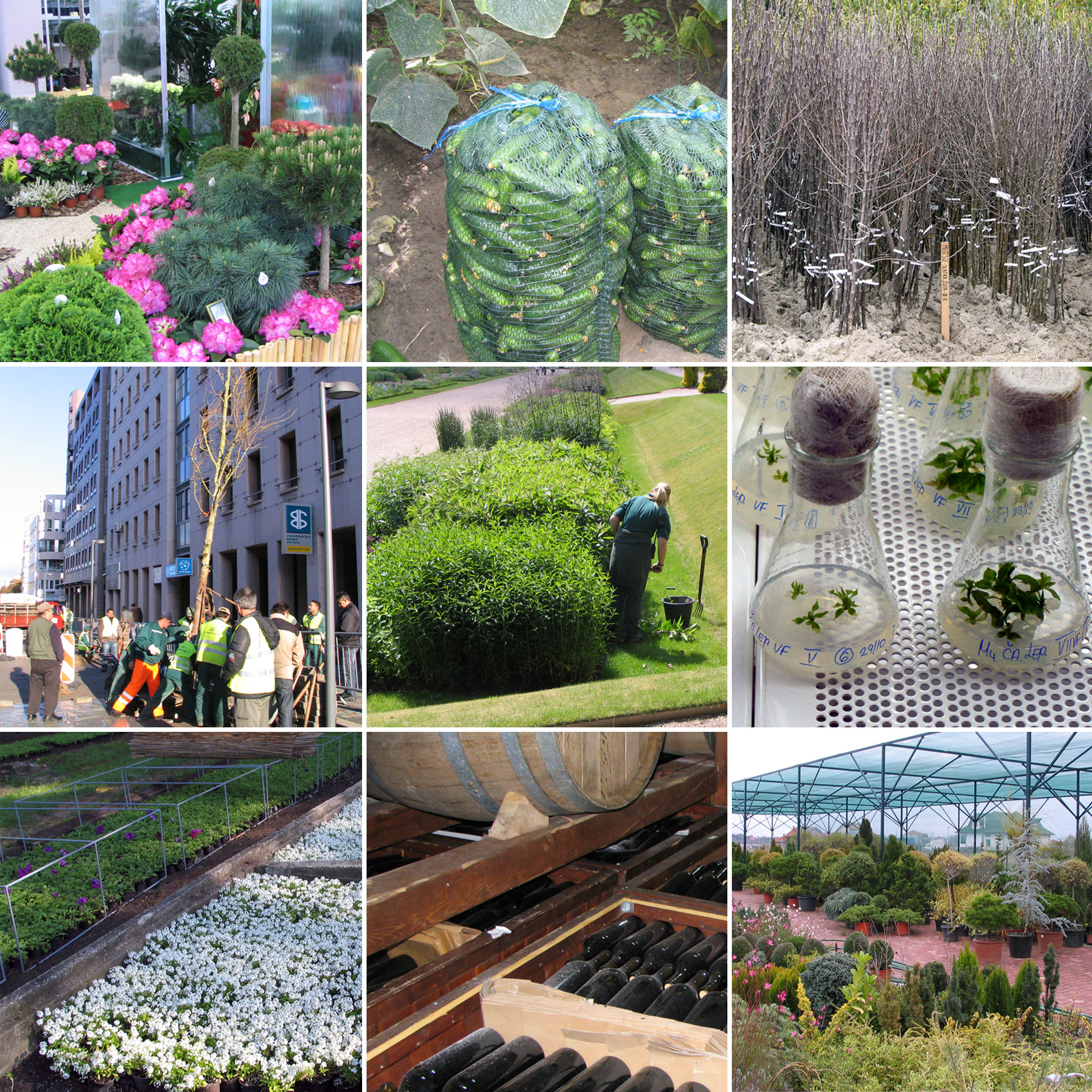 Делатности хортикултуре (фото: Михаило Грбић)